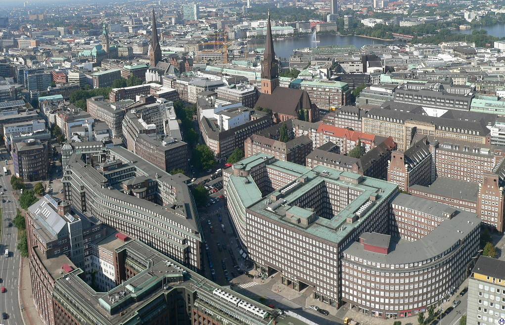 Kontorhausviertel Hamburg, aufgenommen vom Highflyer